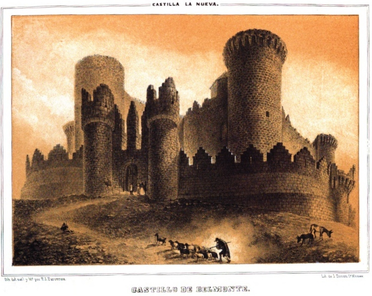 Grabado de Francisco Javier Parcerisa del castillo de Belmonte, España, publicado en el año 1853.